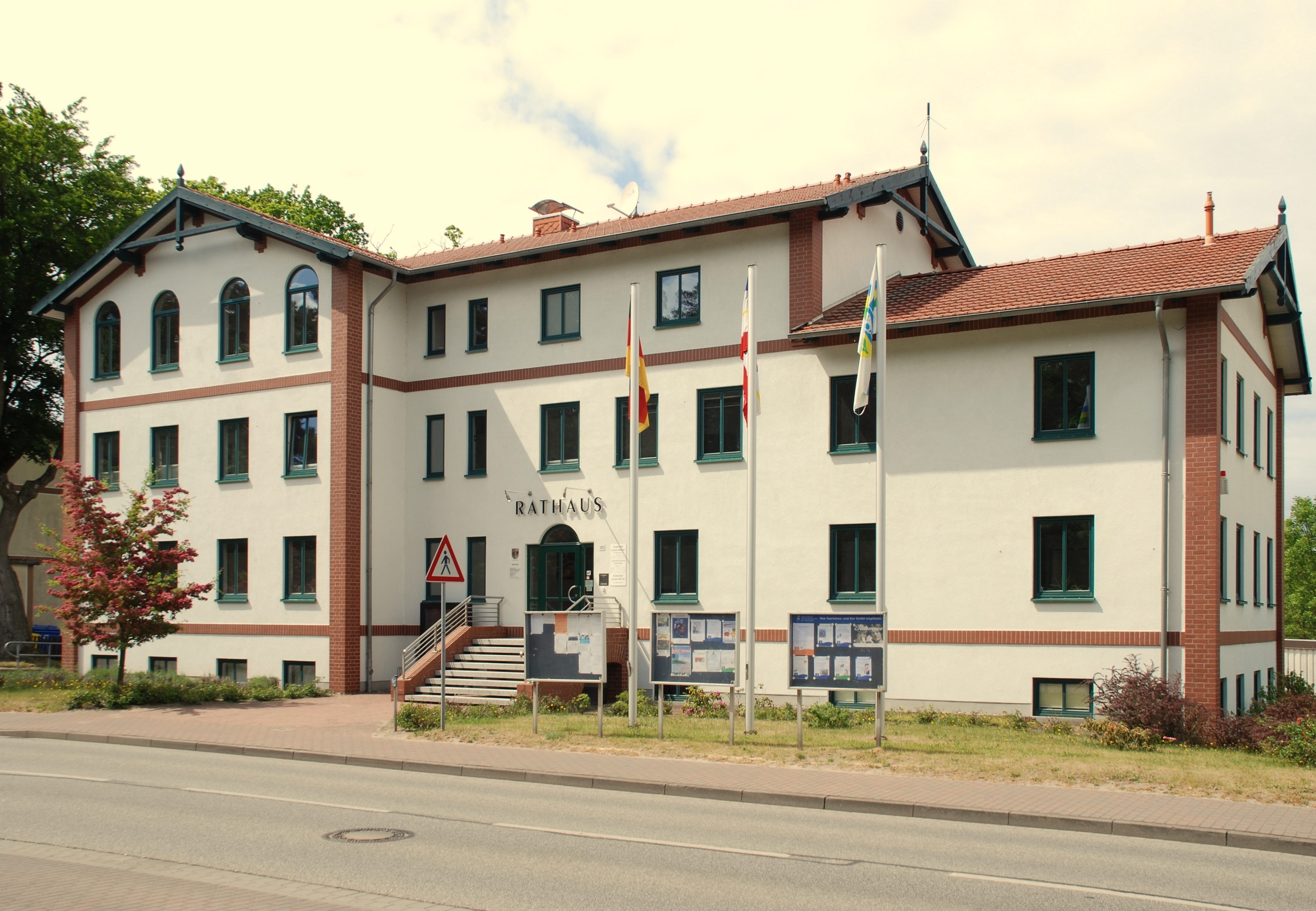 Rathaus Graal Müritz in der Ribnitzer Straße.